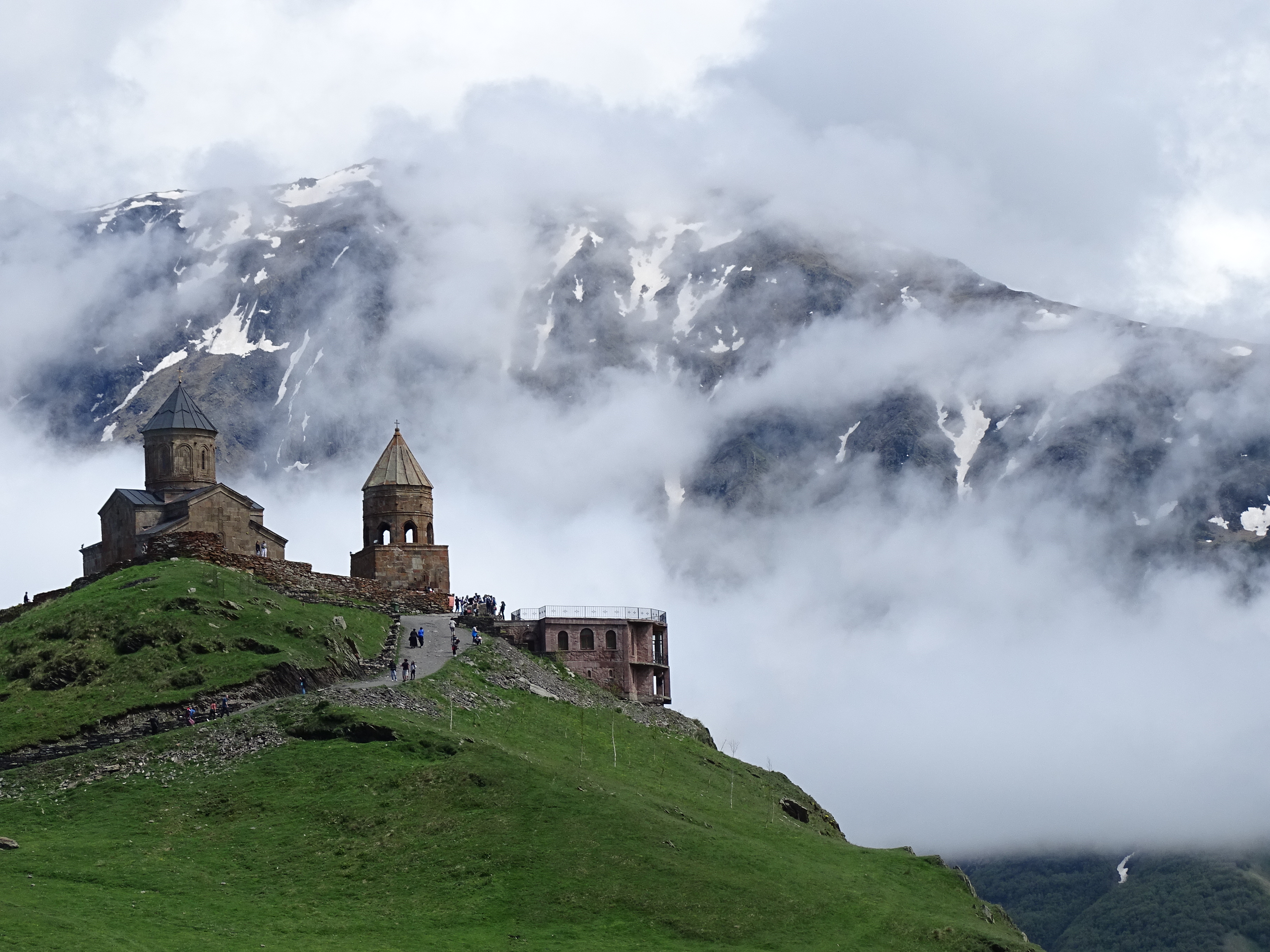 Gergeti Trinity Church - Outside Kazbegi - Georgia - 03